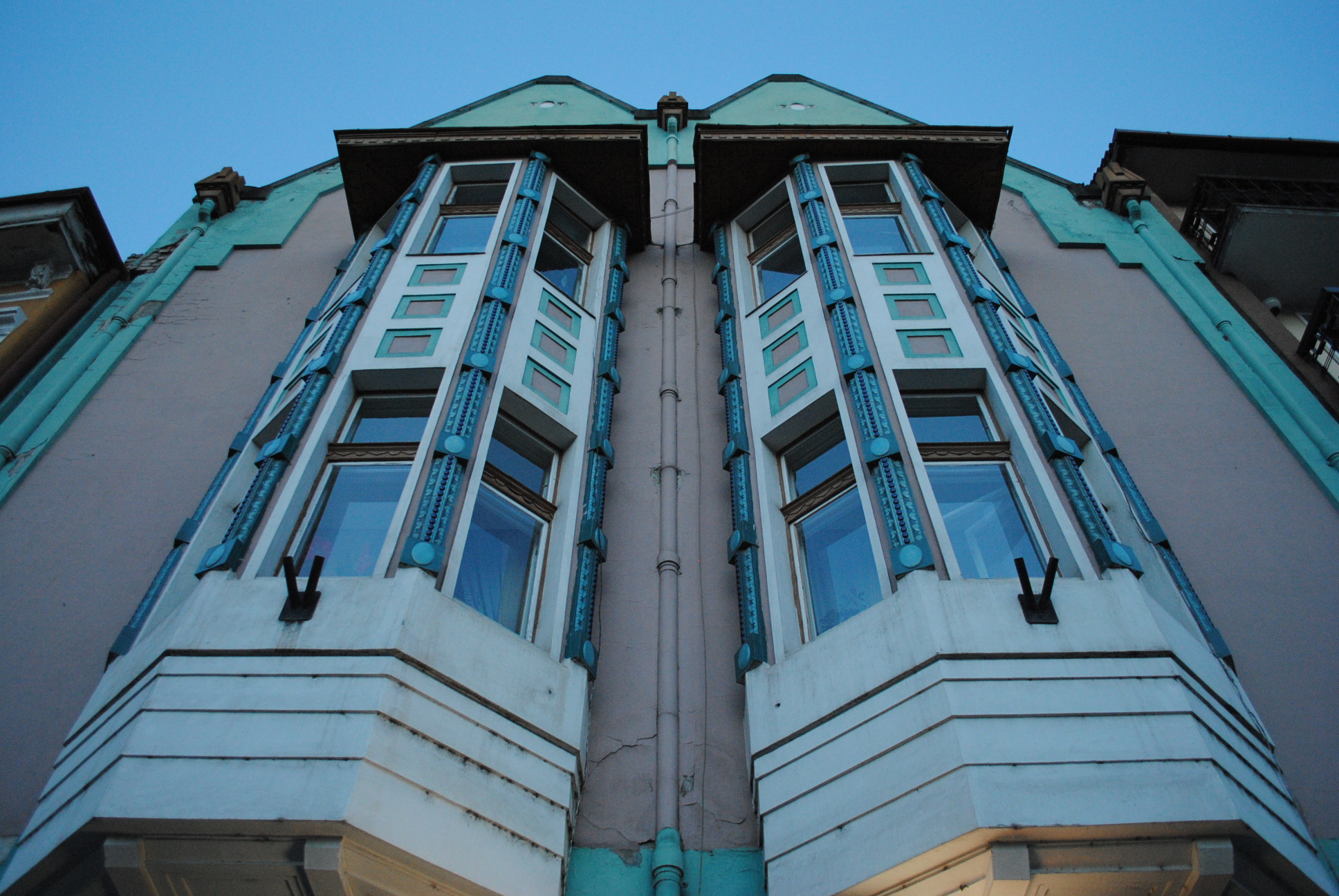 Ansamblul urban "Piața Trandafirilor" sec. XVI - XIX